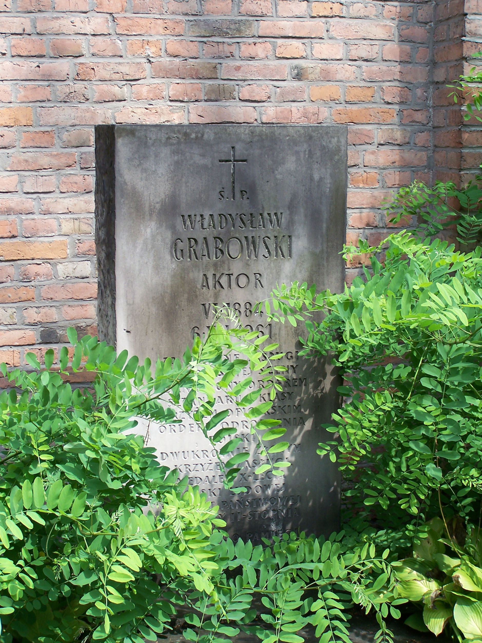 Grave of actor Władysław Grabowski at Powązki Cemetery in Warsaw, Poland